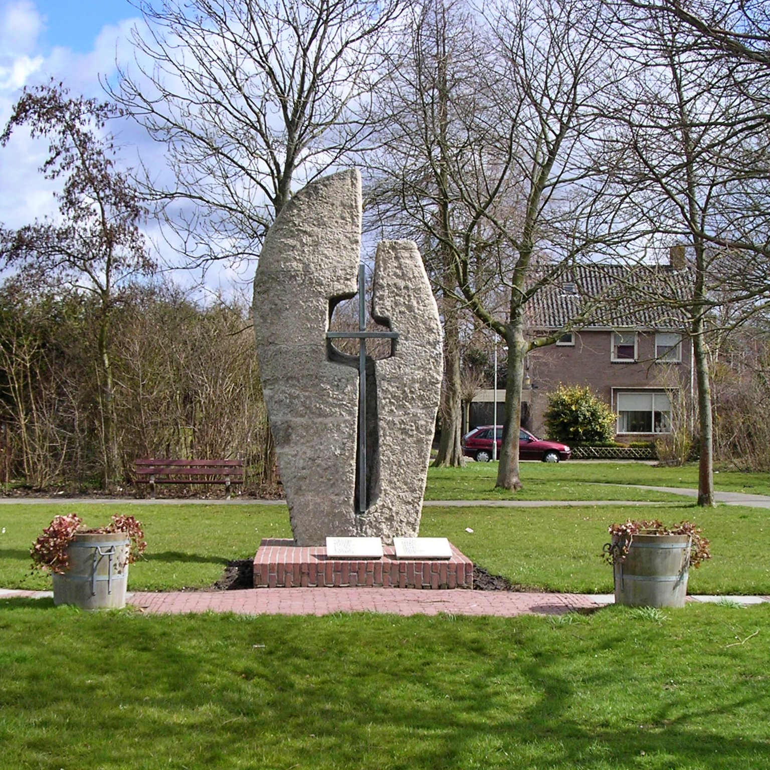 Verzetsmonument in Dokkum, 1965, kunstenaar Peter Gelenscer